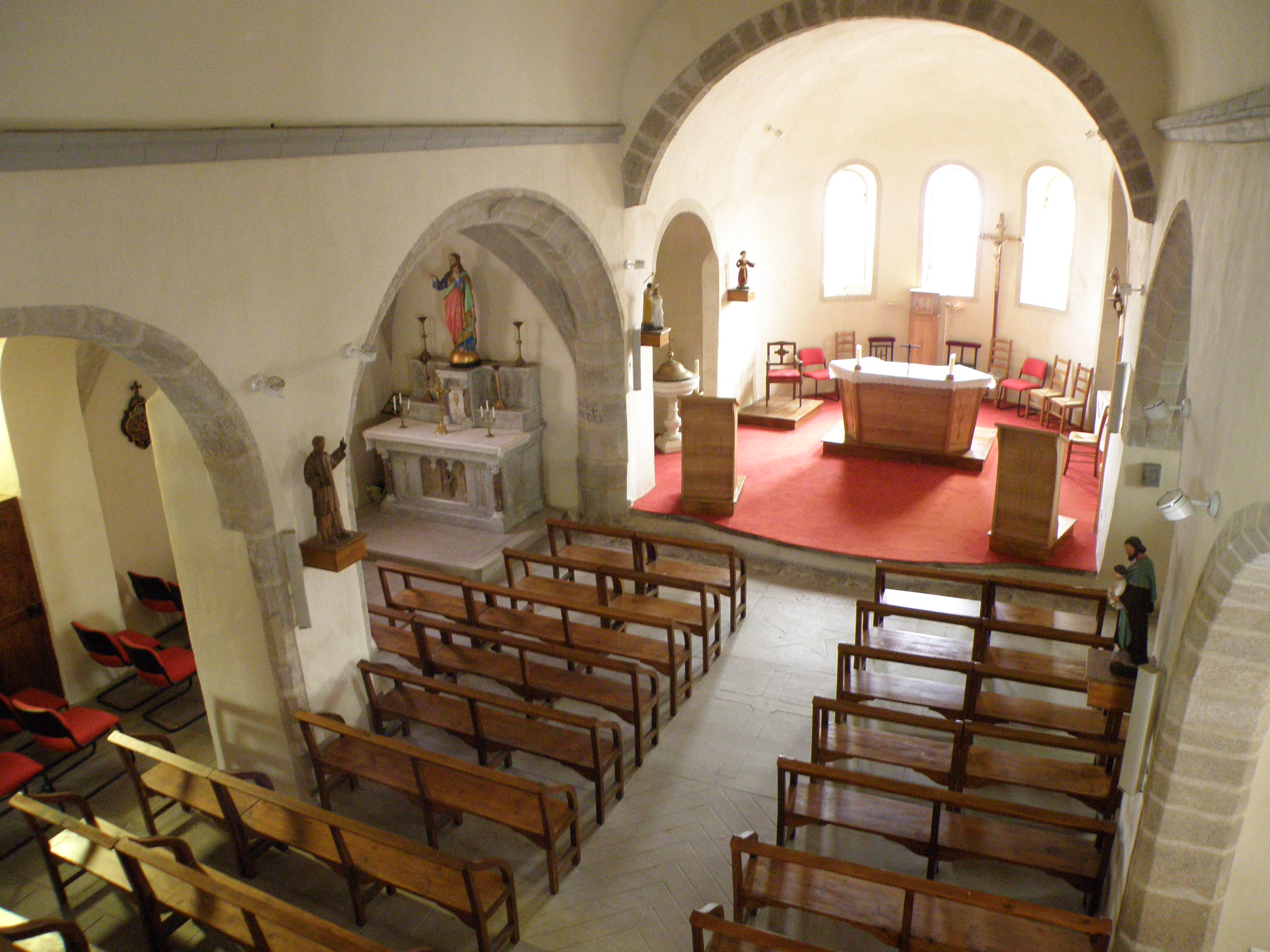 Félines (dép. de la Haute-Loire, Auvergne), France. Église: intérieur, vu depuis la tribune; coup d'oeil vers le choeur.